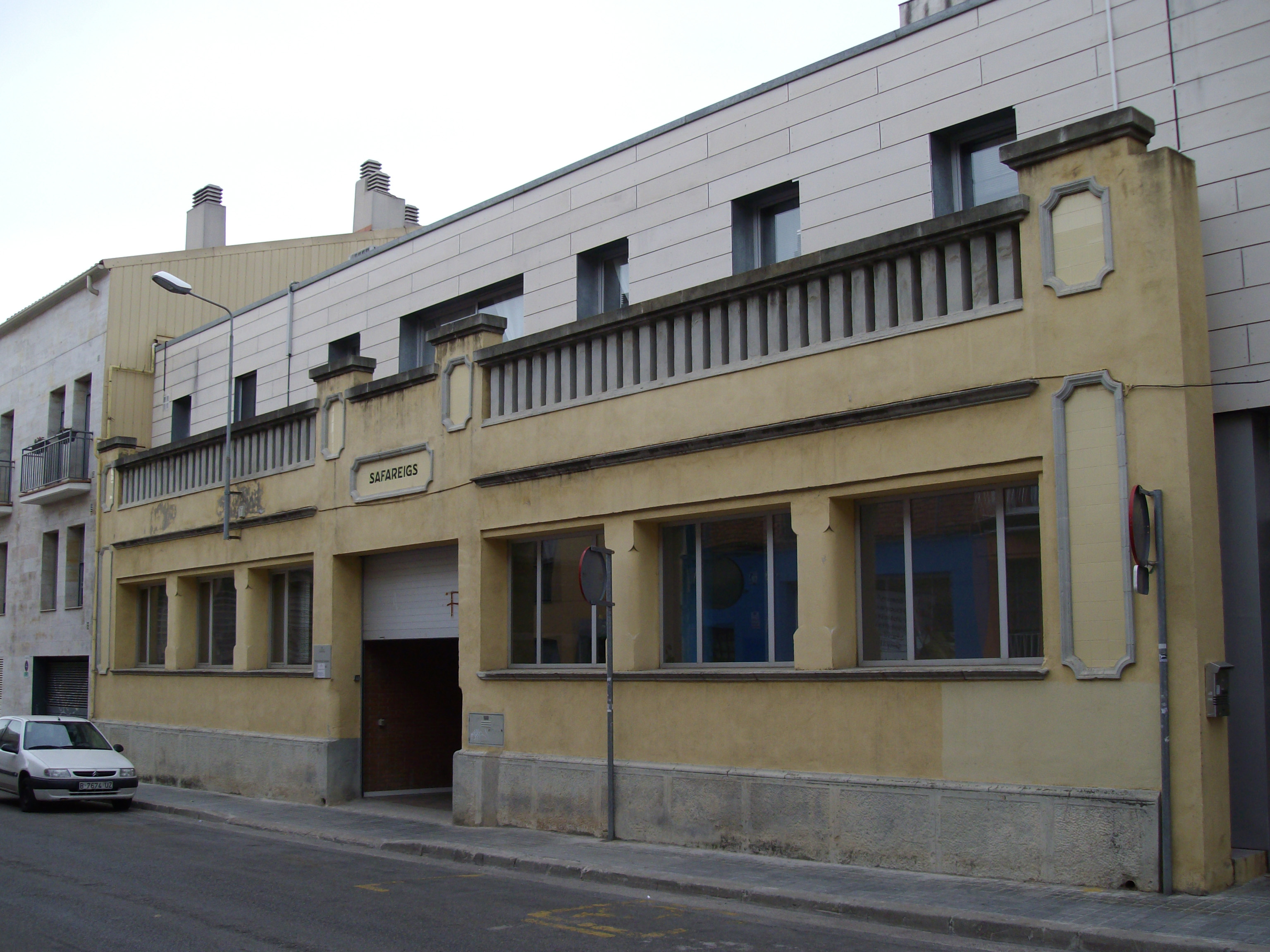 Antiguos lavaderos públicos de Gràcia. Edificio construido por Josep Renom i Costa entre 1930 y 1931, situado en la calle Reina Elionor, 110, de Sabadell, Barcelona (España).